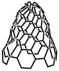 fig 11